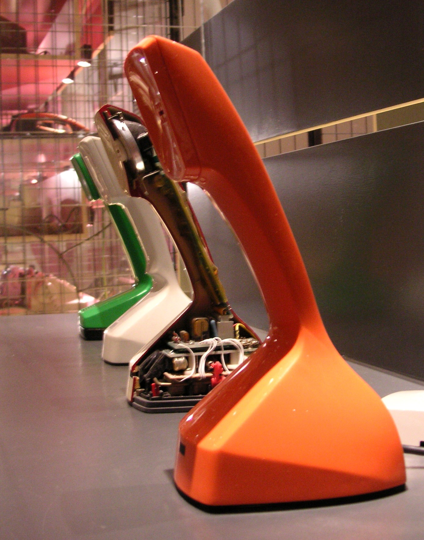 Erikofon DBJ 700